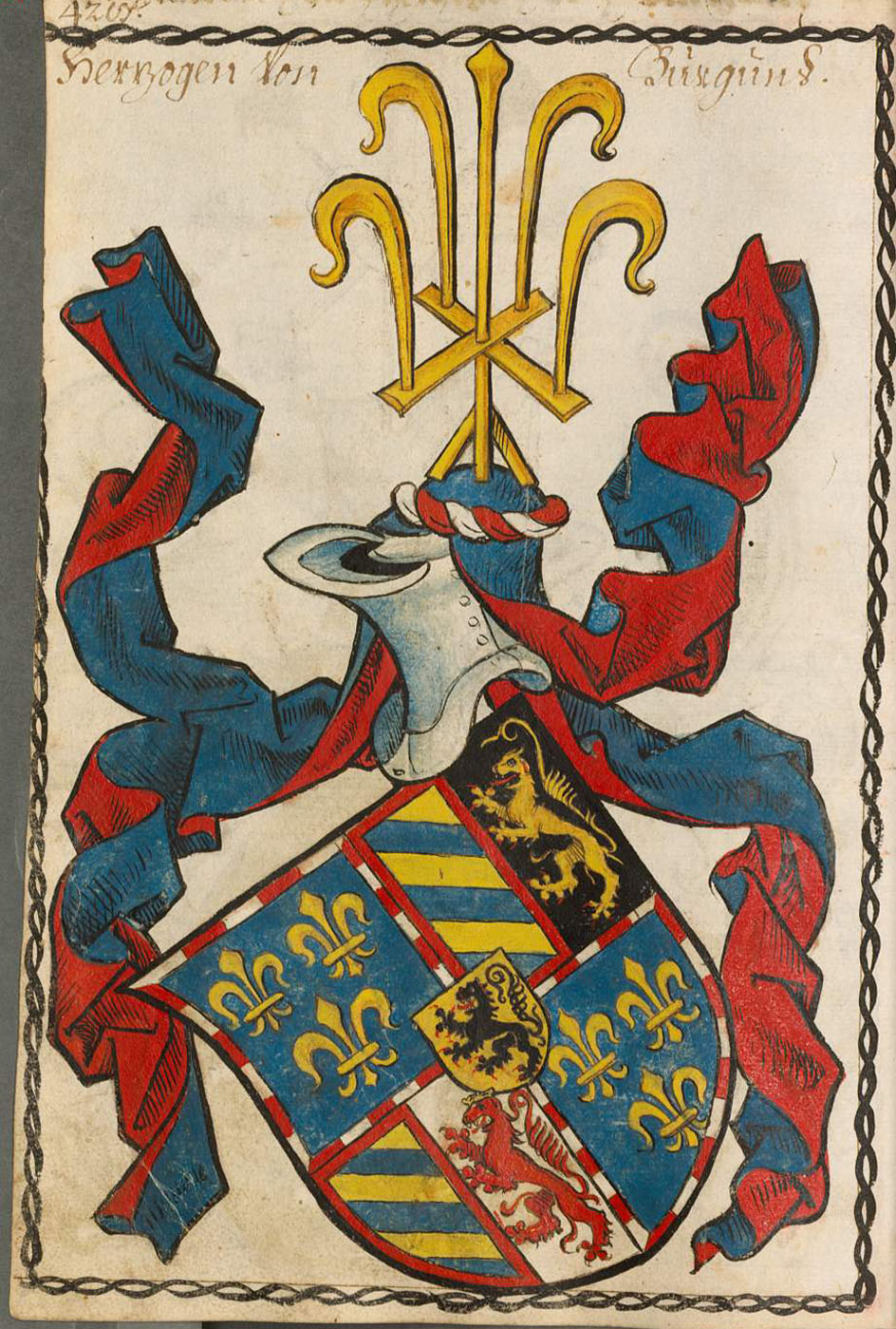 Scheibler'sches Wappenbuch , älterer Teil Herzöge von Burgund